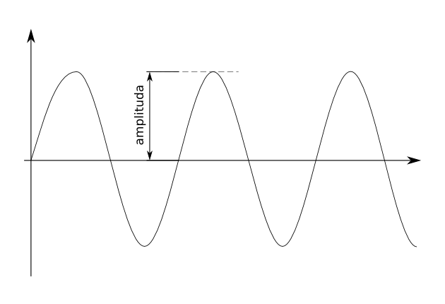 Amplituda.